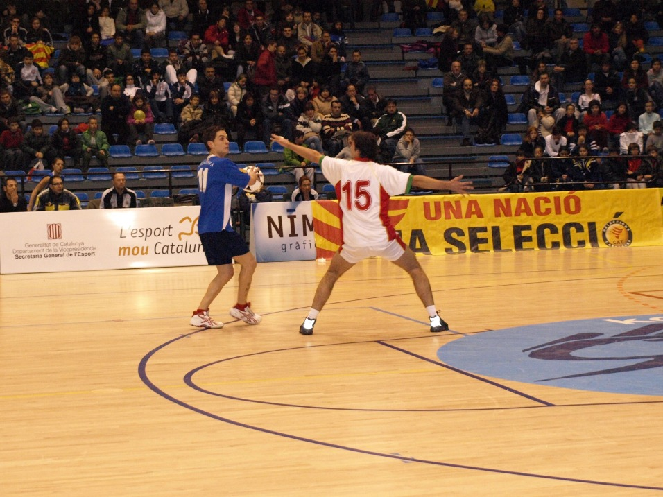 Acció de "defensat" d'un jugador portuguès a un jugador de la selecció catalana a un partit de korfbal.